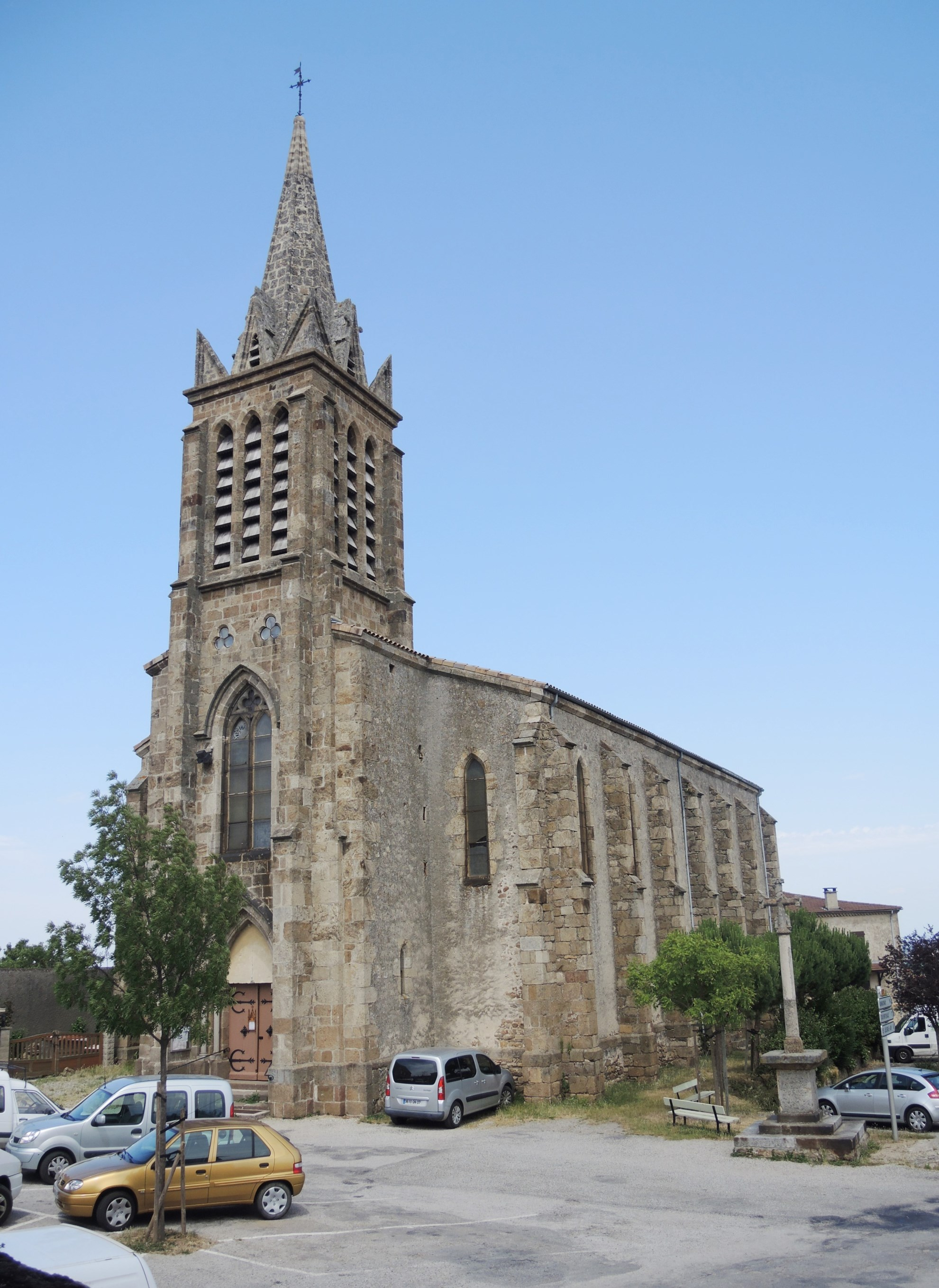 Préaux église extérieur